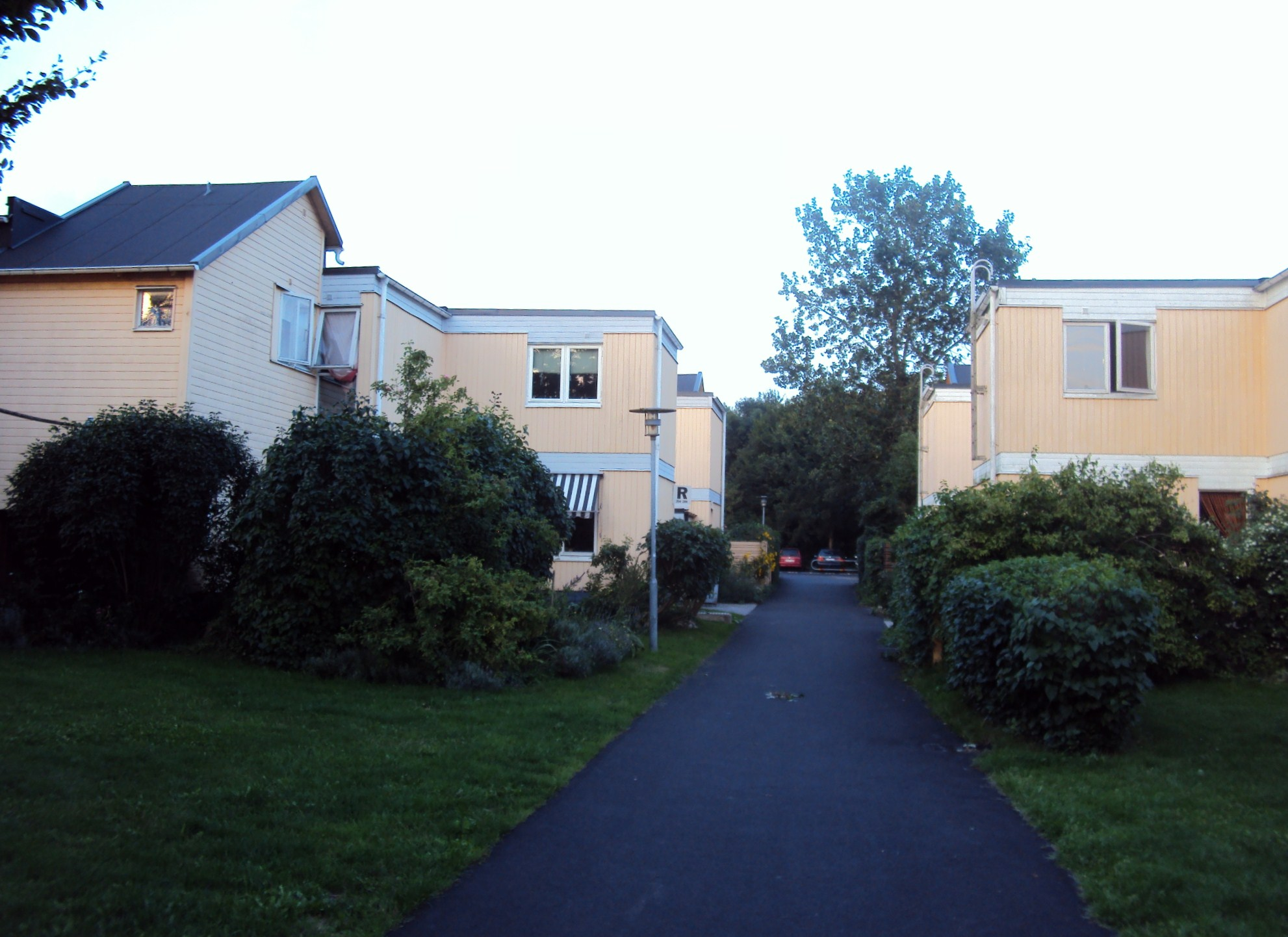 Bostadsområdet Djingis Khan i Lund